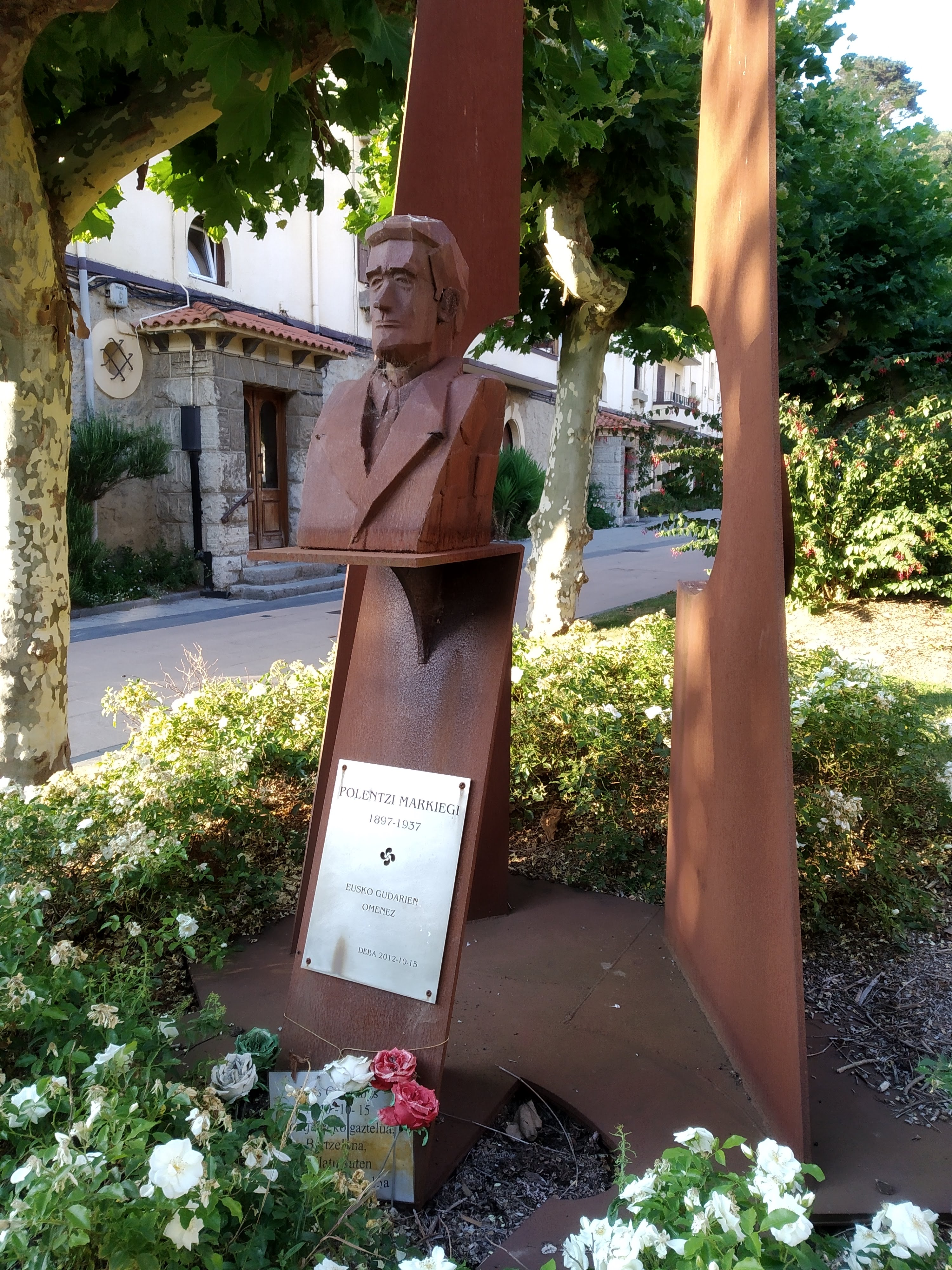 Debako alkate fusilatuaren omenezko oroigarria. Eusko Gudarien omenez, dio plakak, ez bakarrik Markiegiren omenez beraz. 2012-10-15ean inauguratutako oroigarria. Egilea, Willy Berasaluze Latsurregi, Polentziren iloba baten seme.